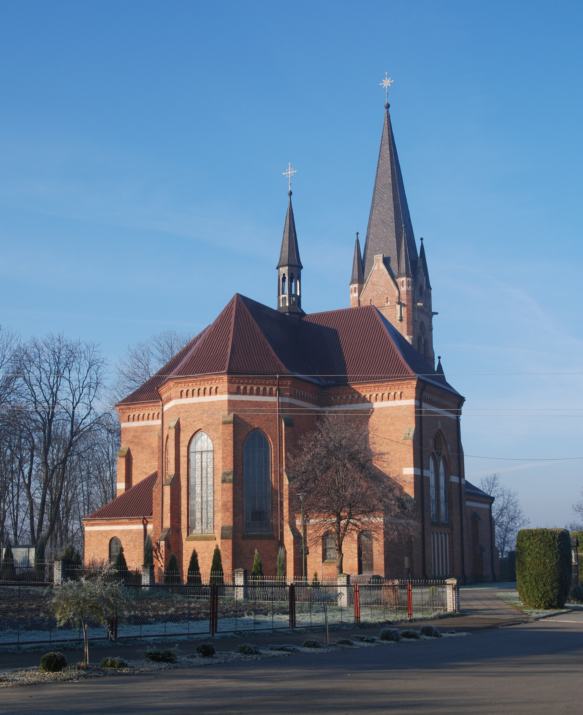 Osobnica, kościół par. p.w. św. Stanisława Biskupa i św. Jadwigi Śląskiej, 1906